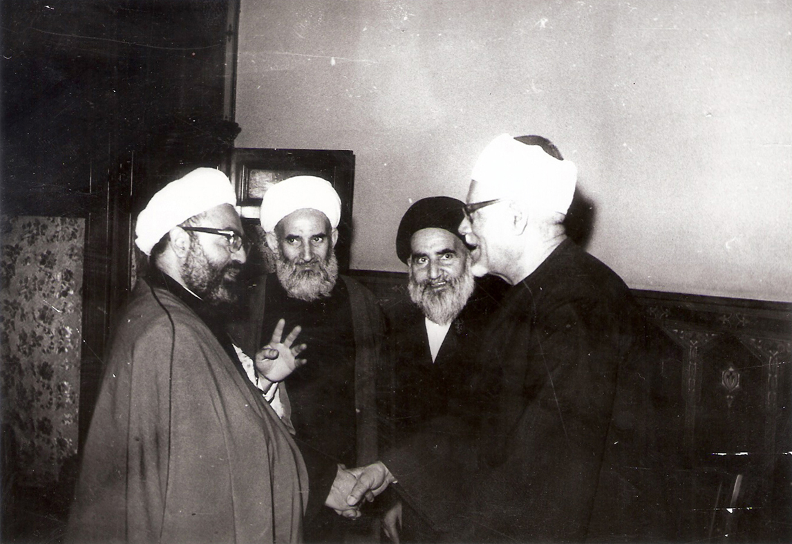 دیدار آیت الله محمد واعظ زاده خراسانی با دکتر محمد الفحام شیخ الأزهر مصر